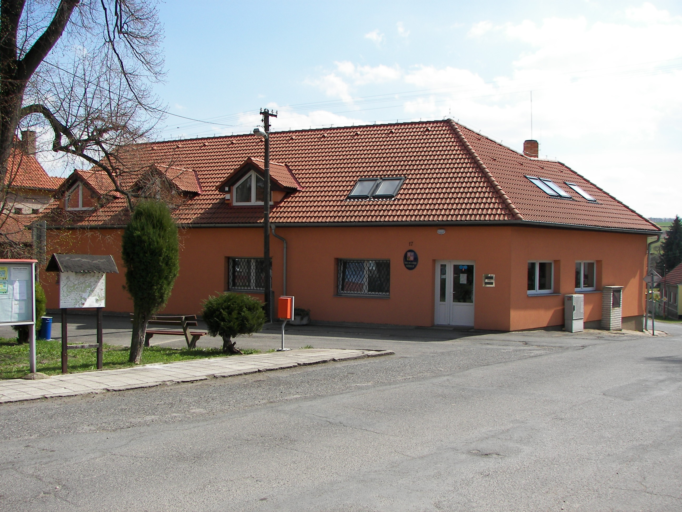 Obecní úřad v Ledcích na kladensku